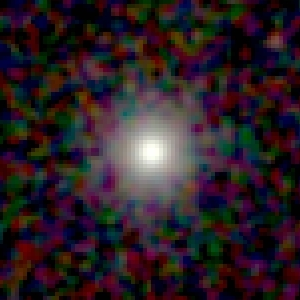 Galaxy NGC 79